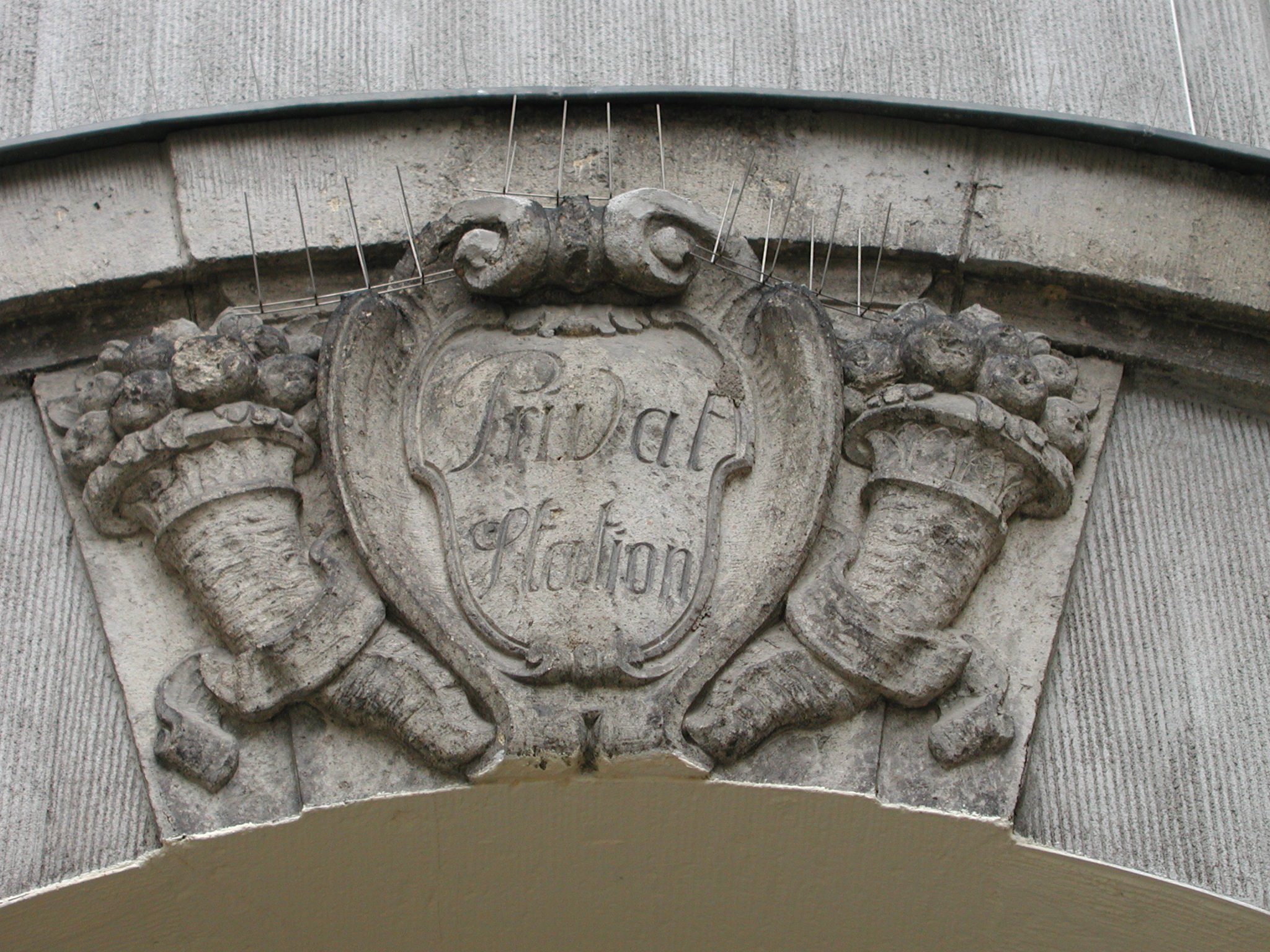 Gebäudedetail im Oskar-Ziethen-Krankenhaus(4)